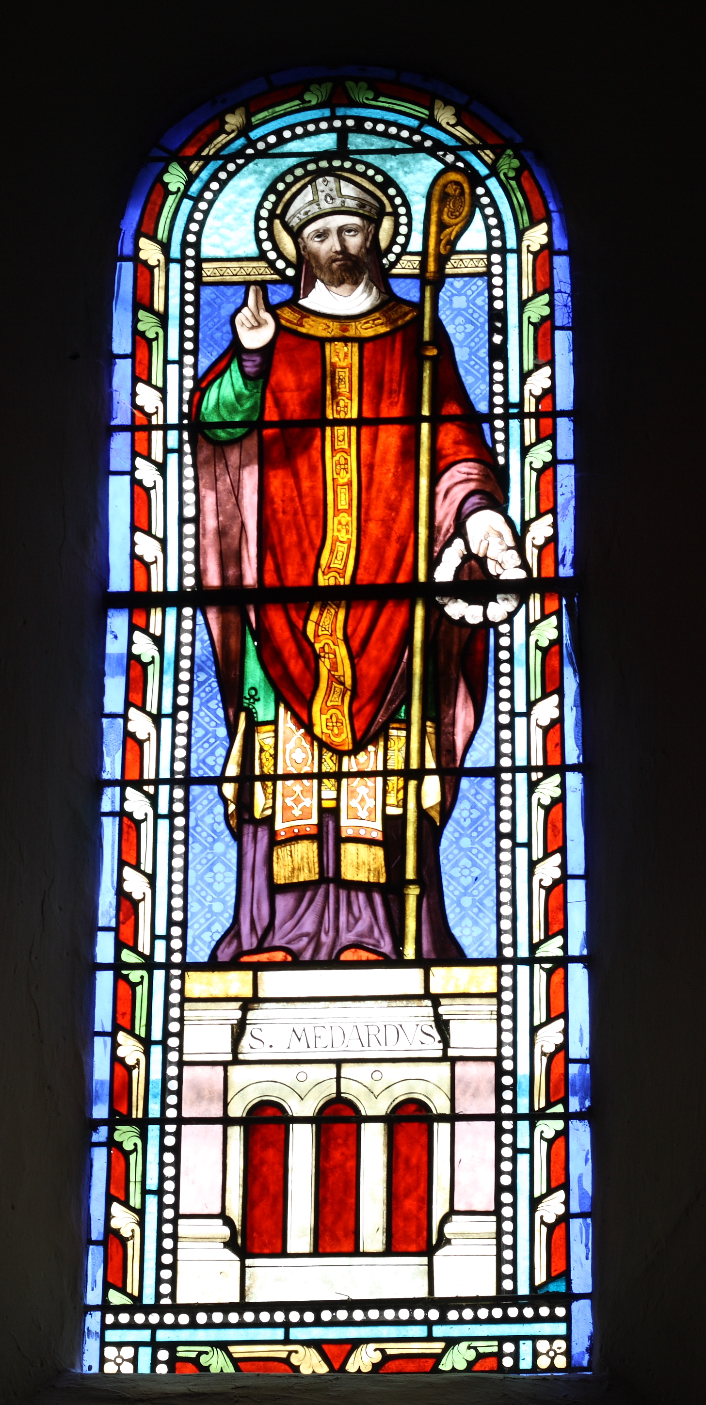 Bleiglasfenster in der romanischen Kirche Notre-Dame in Piégros-la-Clastre, Darstellung: hl. Medard